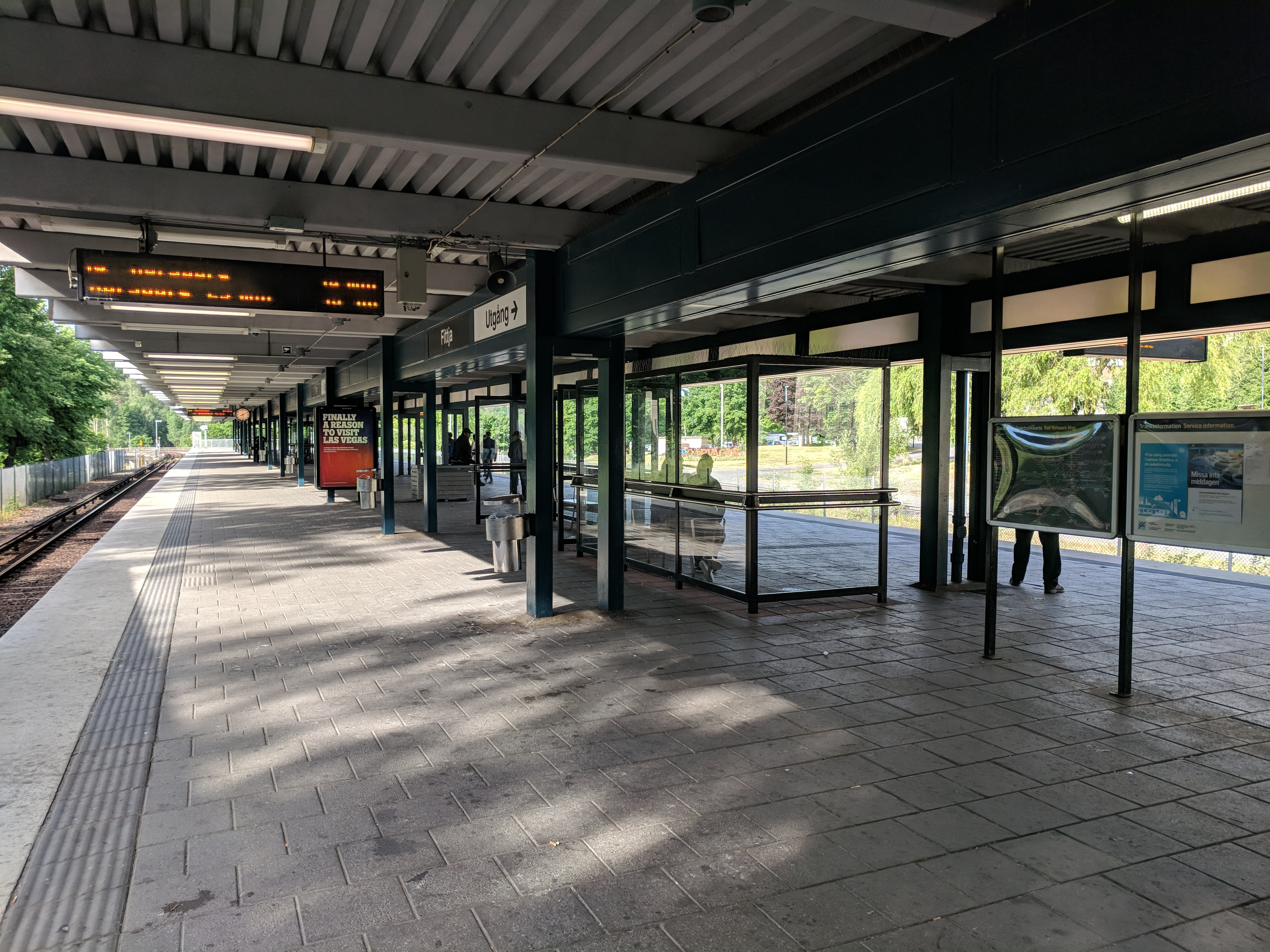 Fittja tunnelbana